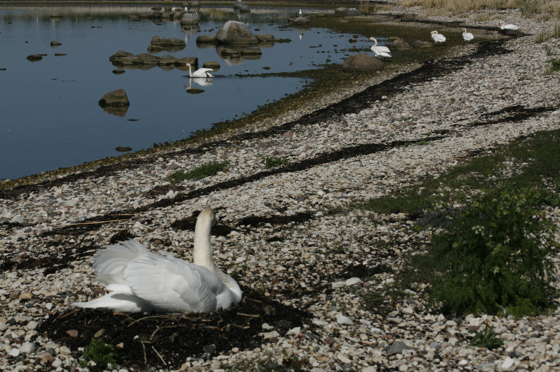 Kühmnokk-luiged pesitsemas, Hanilaid Pärnumaal